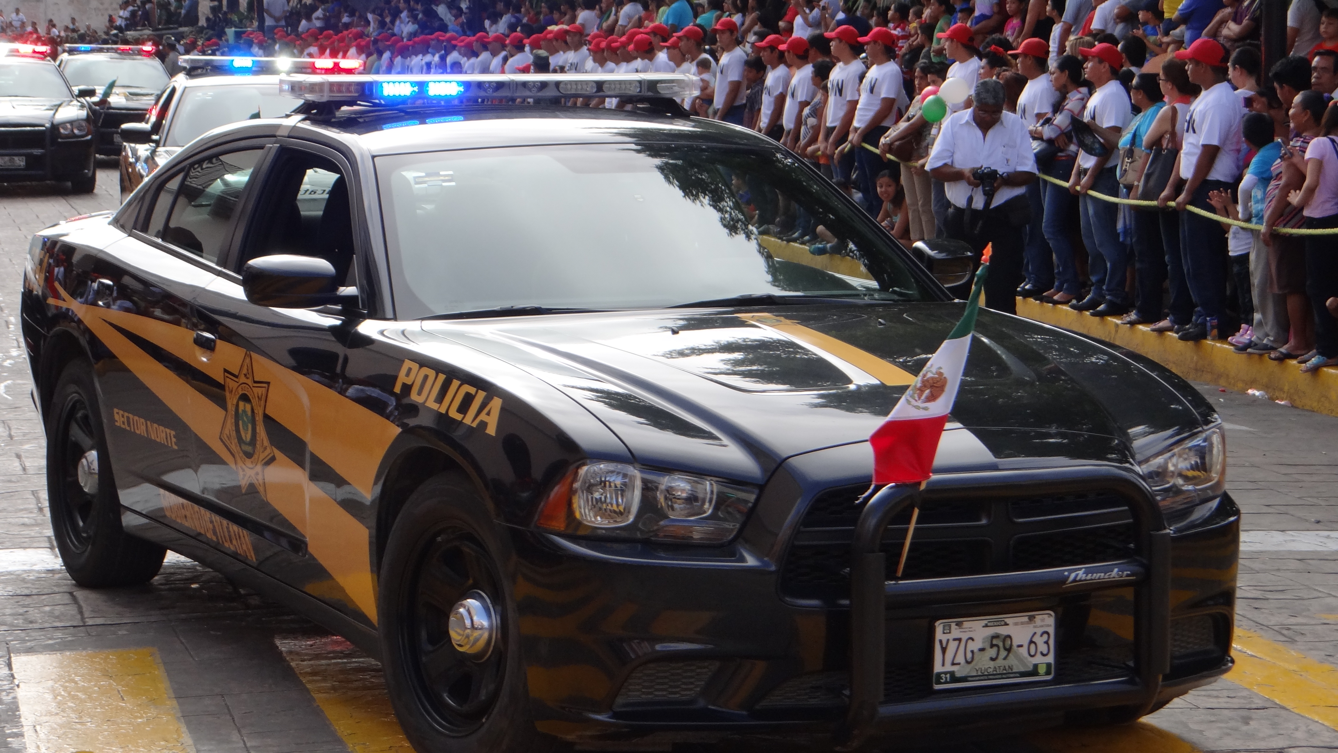 Dodge Charger Policía estatal de Yucatán.